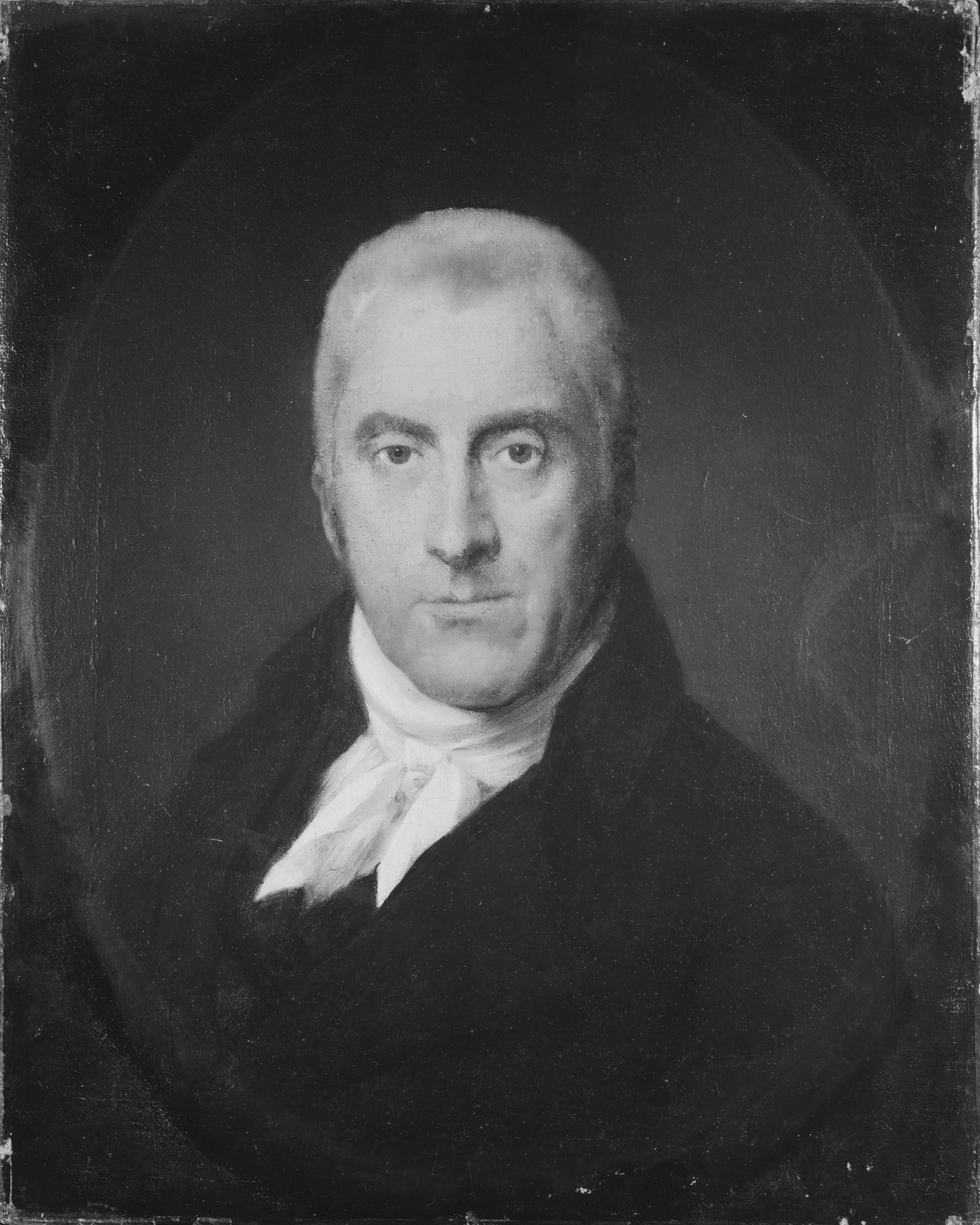 Jan Couperus (1755-1833), baljuw van Gouda en volksvertegenwoordiger